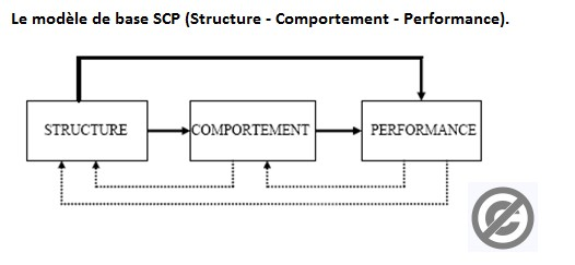 modele SCP